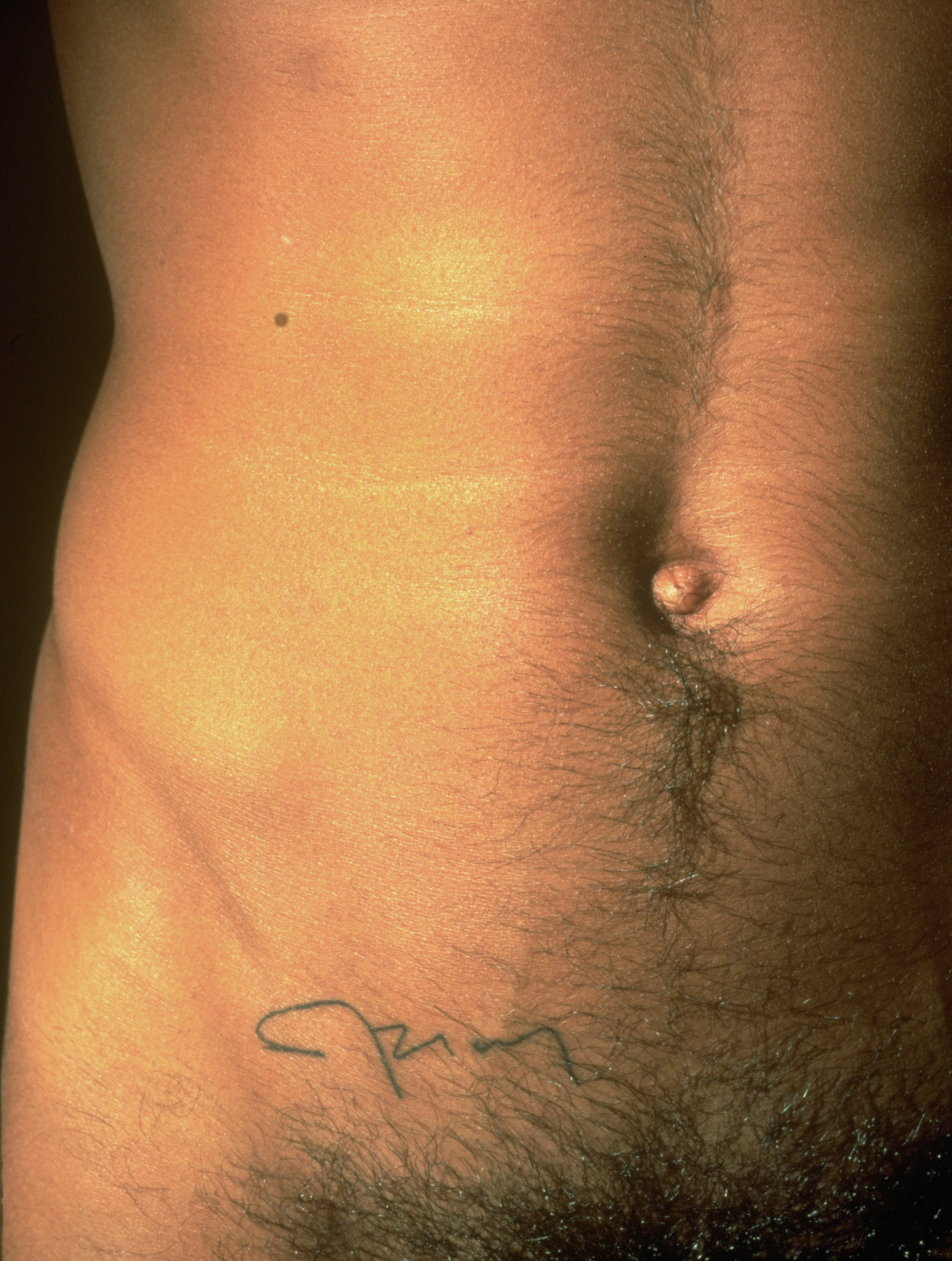 Tatuaje firma de Fernando Arias